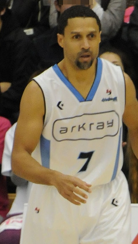 京都ハンナリーズのマクムード・アブドゥル＝ラウーフ選手。能代市総合体育館で。